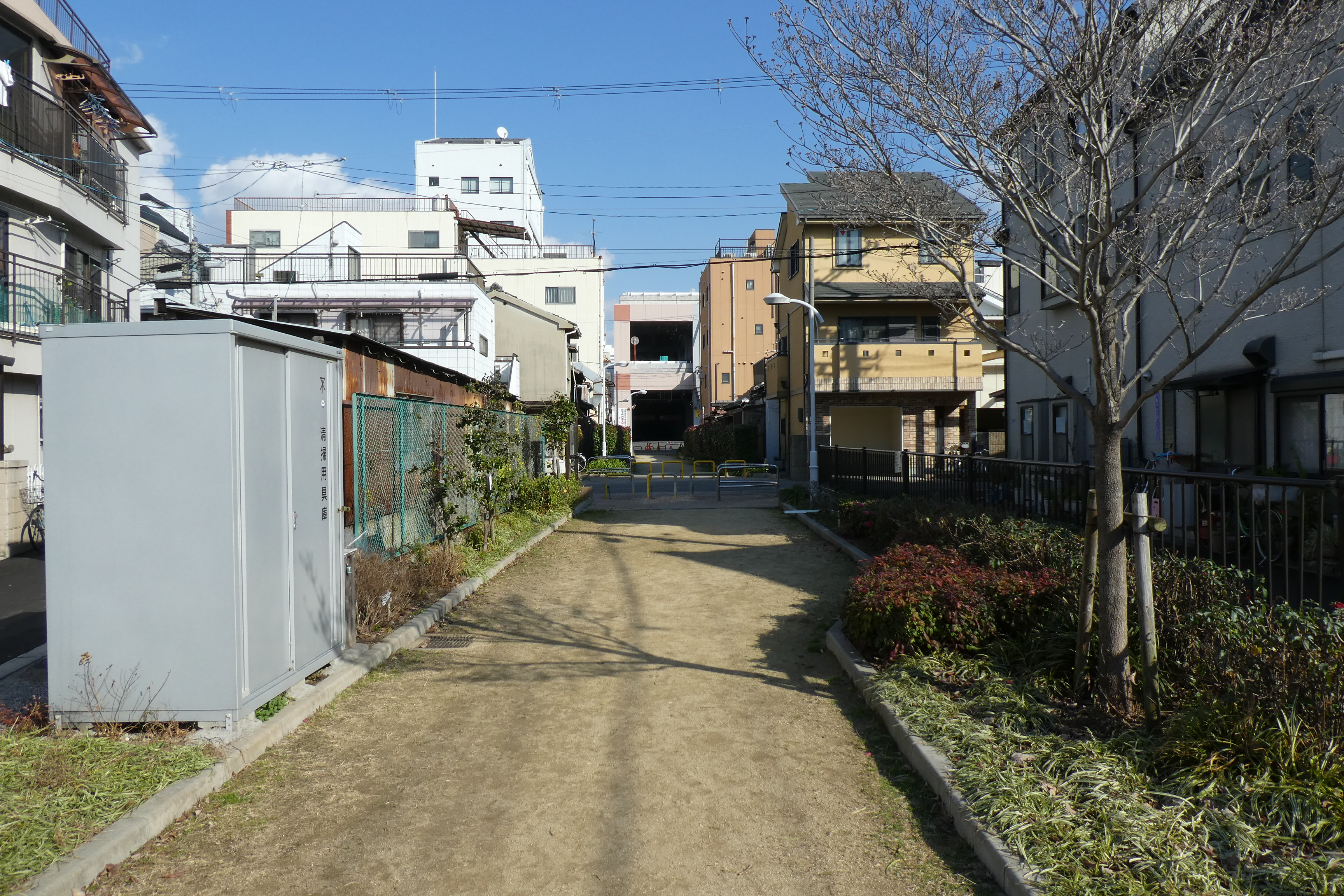 大阪環状線 大阪市場支線 線路跡。